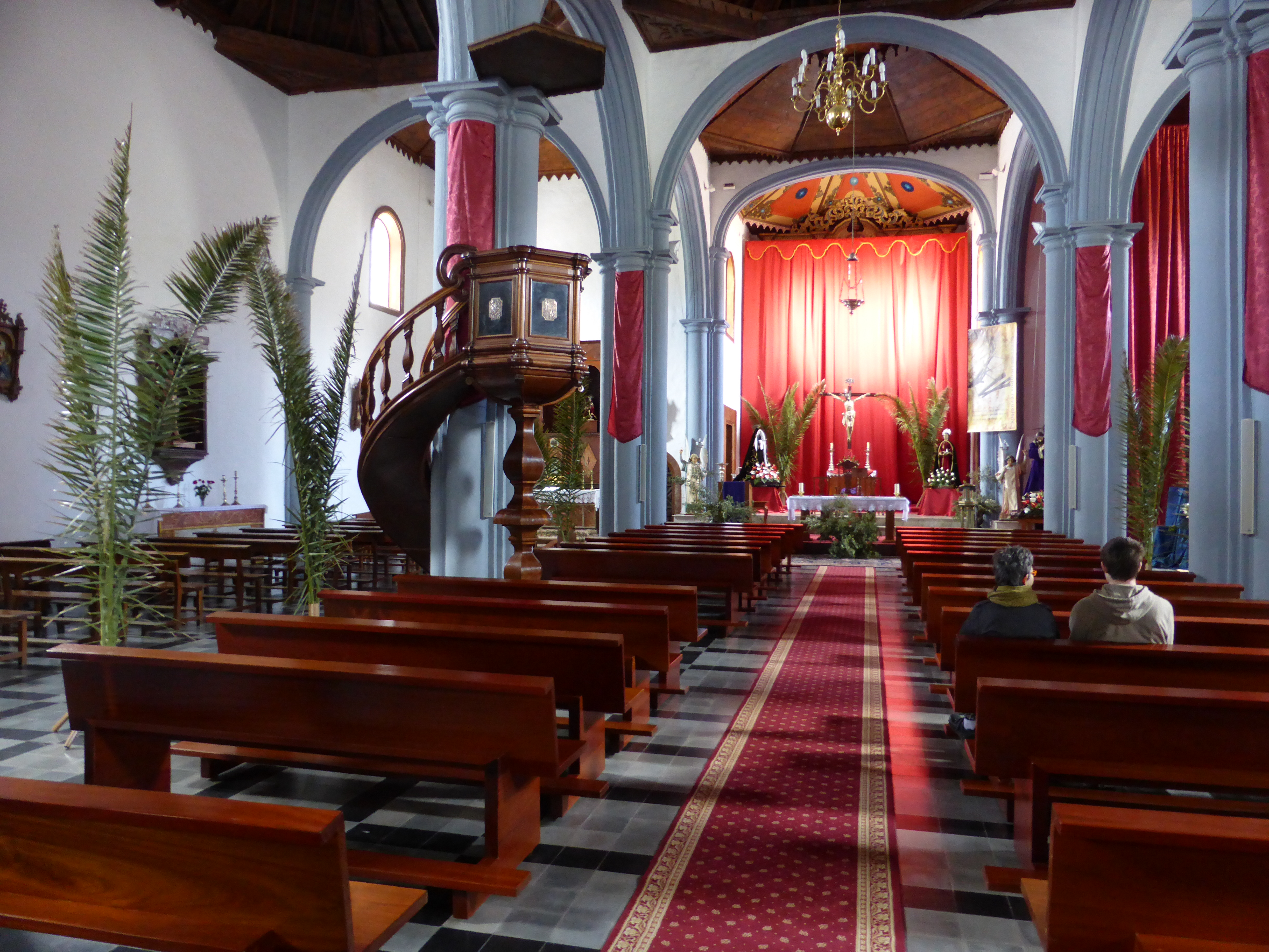 Interior de la iglesia de la Concepción, de un estilo barroco clasicista, terminada en el año 1820. Fotografía tomada en tiempo litúrgico de Semana Santa, con colgaduras que ocultan retablos.